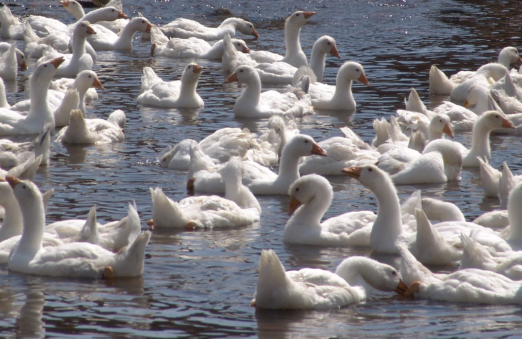 Junge Hausgänse in Freilandhaltung (2005)